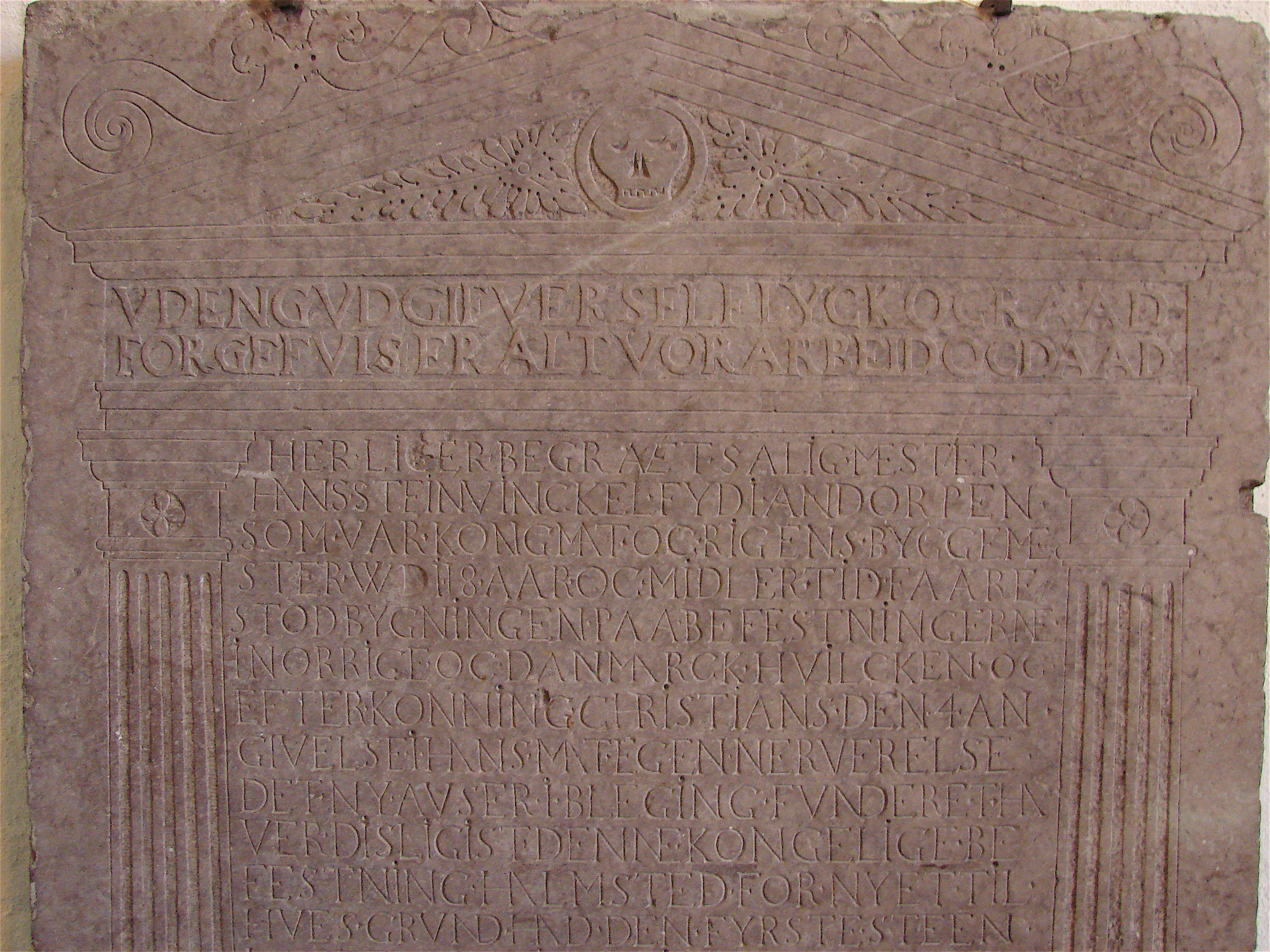 Hans van Steenwinckel den ældres gravsten i Halmstad / Halmsted kirke